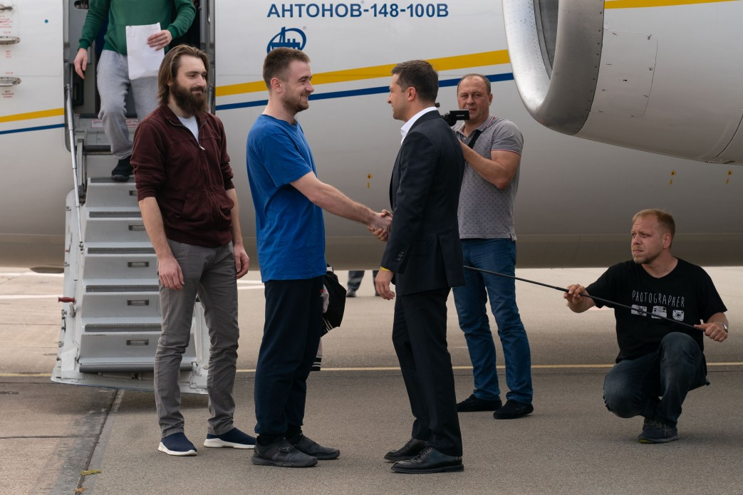 Президент зустрів українців, які повернулися додому у рамках взаємного звільнення Україною та РФ утримуваних осіб, 7 вересня 2019 року